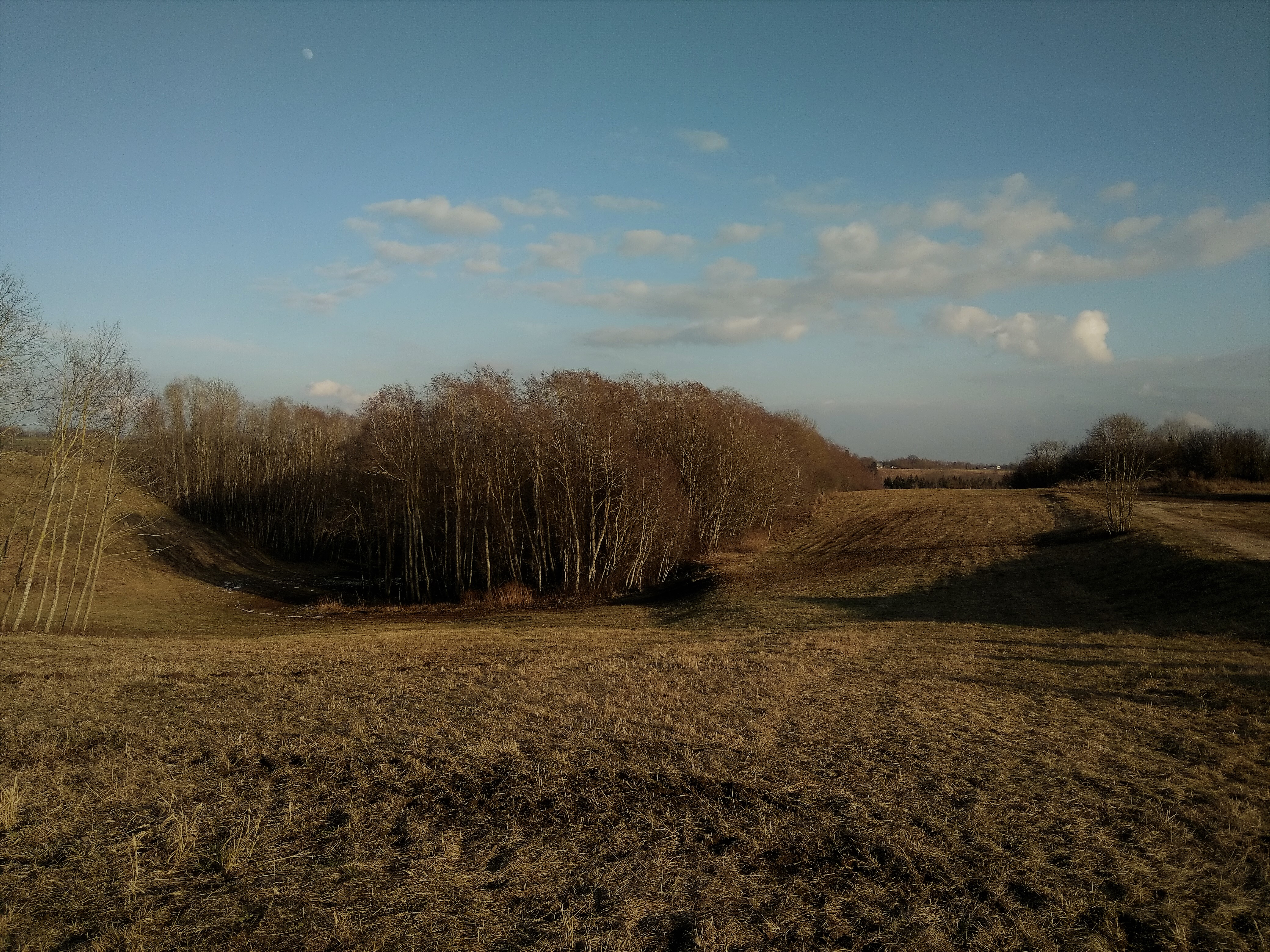 Vaade loodest linnuse maa-ala põhjaküljest piiravale sälkorule.